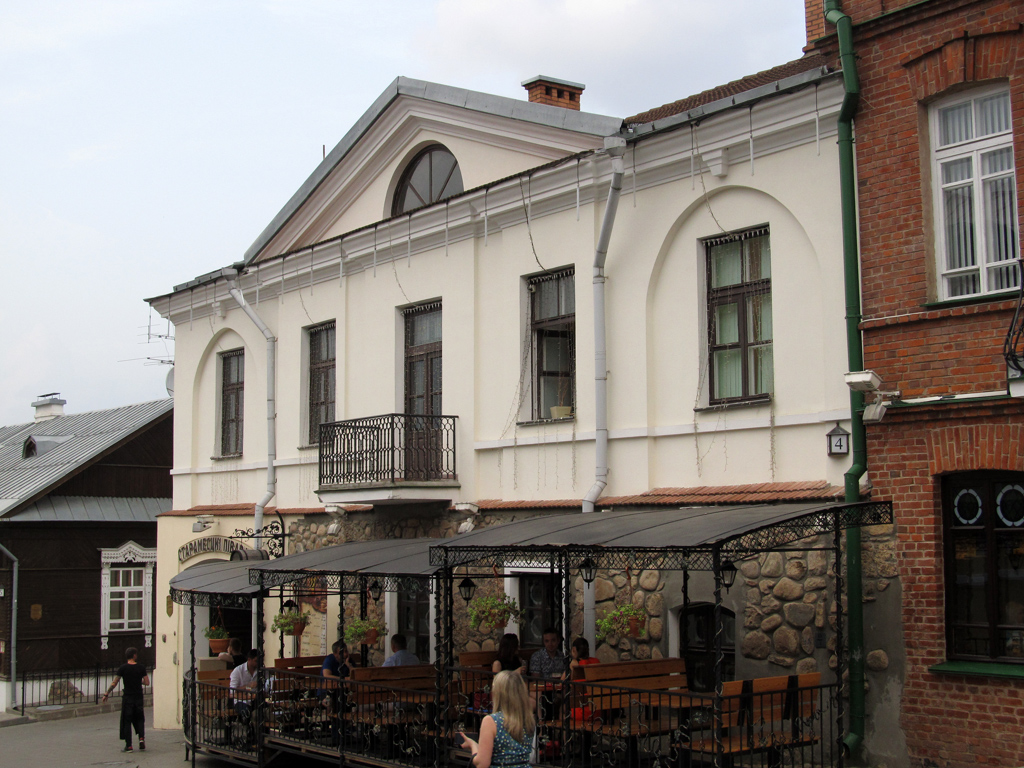 Мінск. Вуліца Герцэна, 4